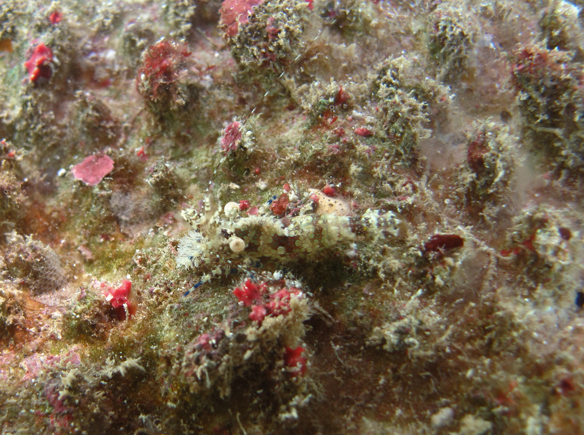 Une crevette Saron neglectus à la Réunion.